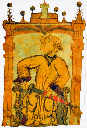 Den Tarik ibn Zyiad